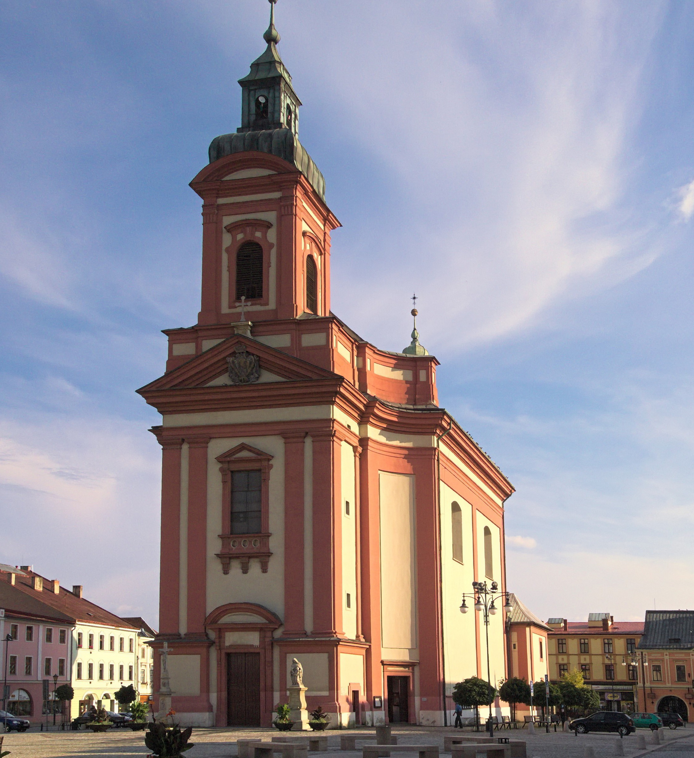 Kostel Stětí svatého Jana Křtitele, Masarykovo náměstí, Hranice (okres Přerov).